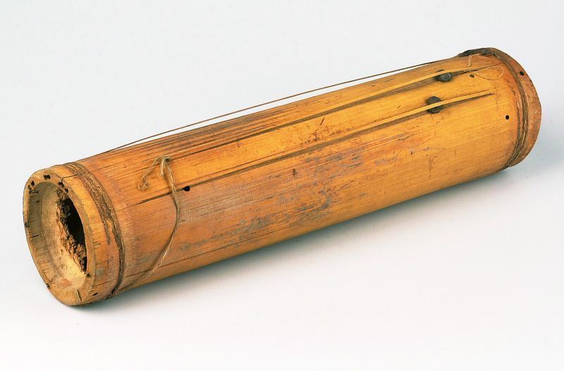 Tokkelinstrument. Buisciter van bamboe Unknown language: Gong tondu